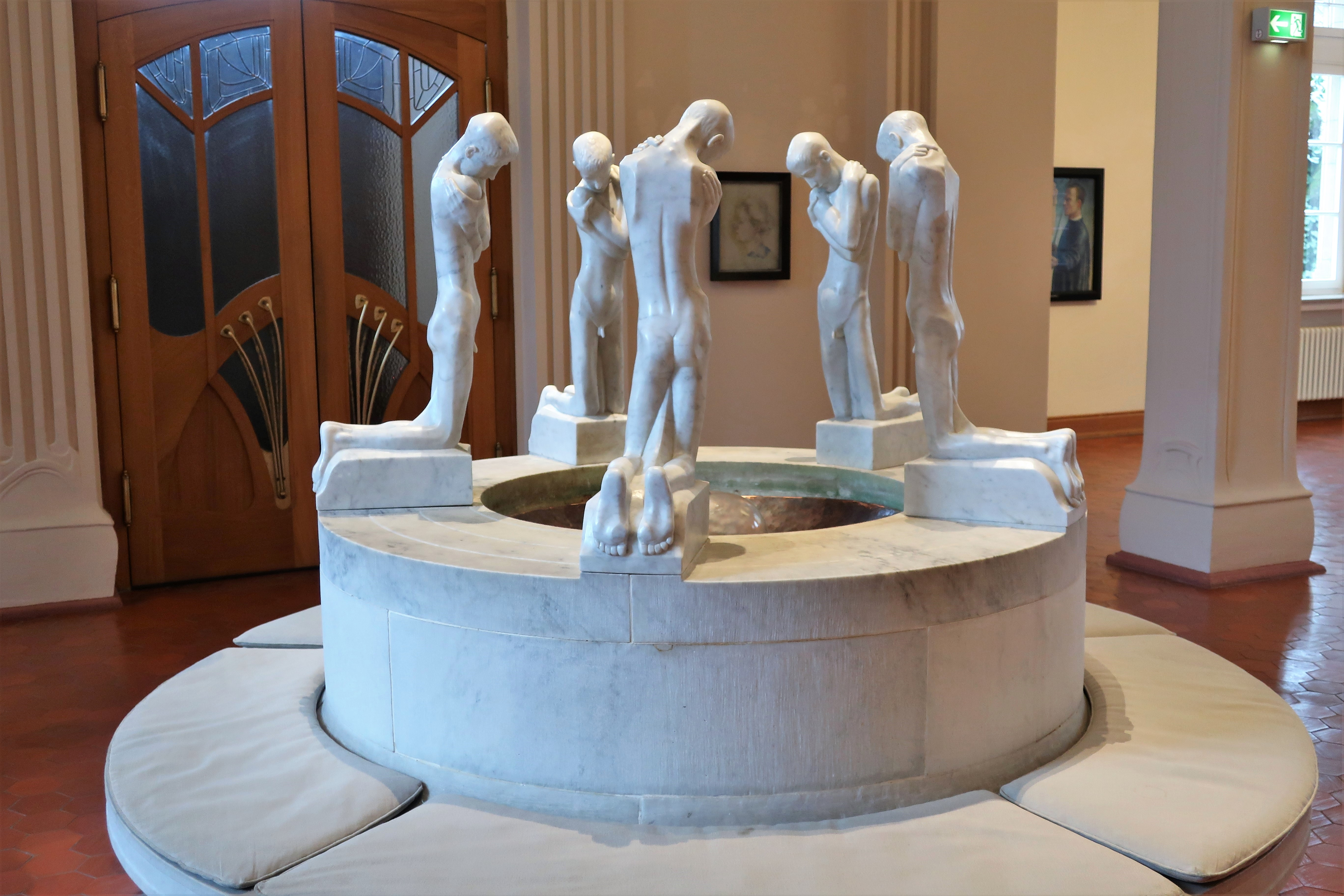 Osthaus Museum Hagen. Brunnen mit knienden Knaben, Replik (1972) von Paul Kussmann nach George Minne (1866-1941).